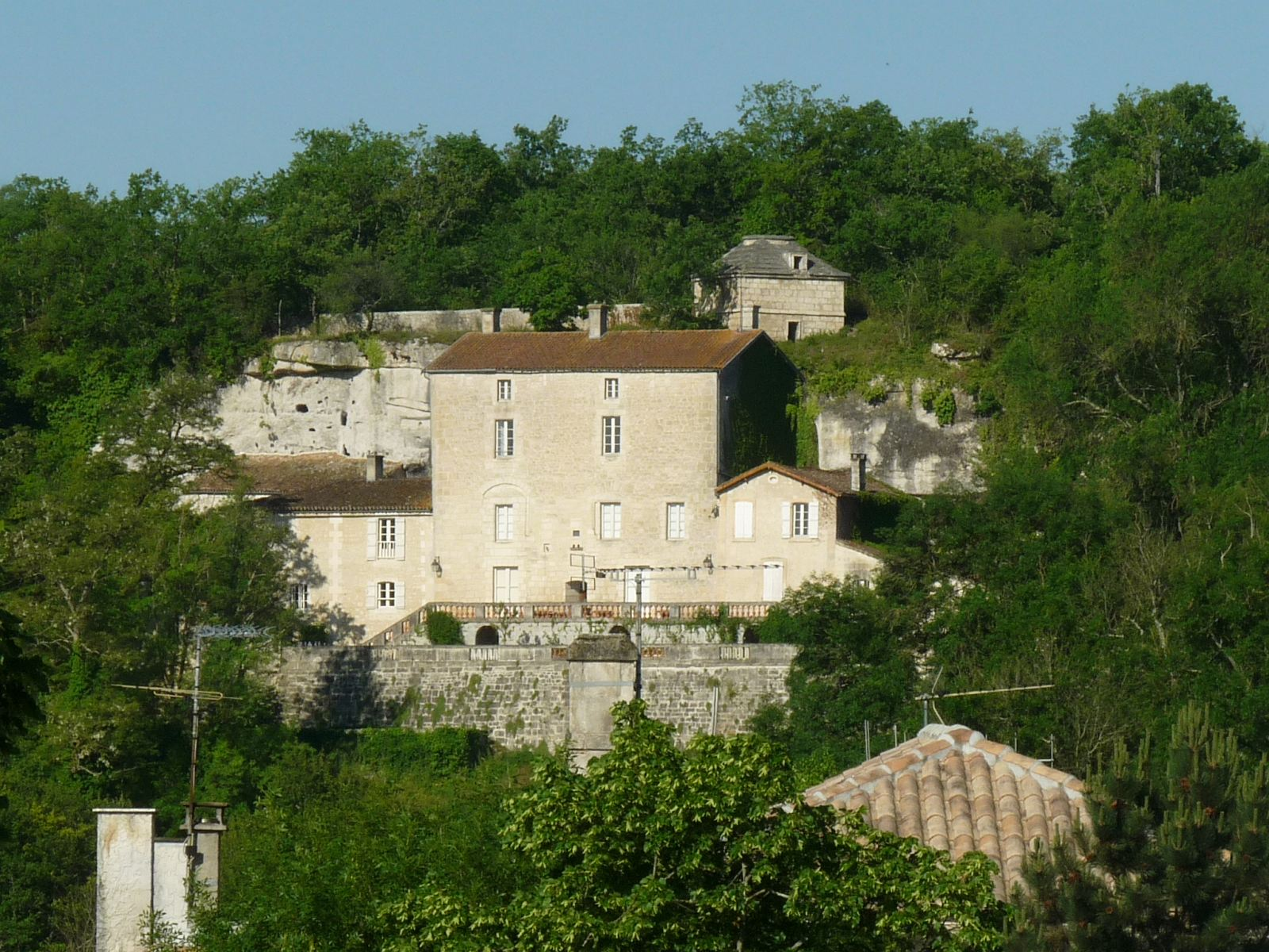 Rochecorail vu depuis le Pont de la Meure, Nersac (16), France